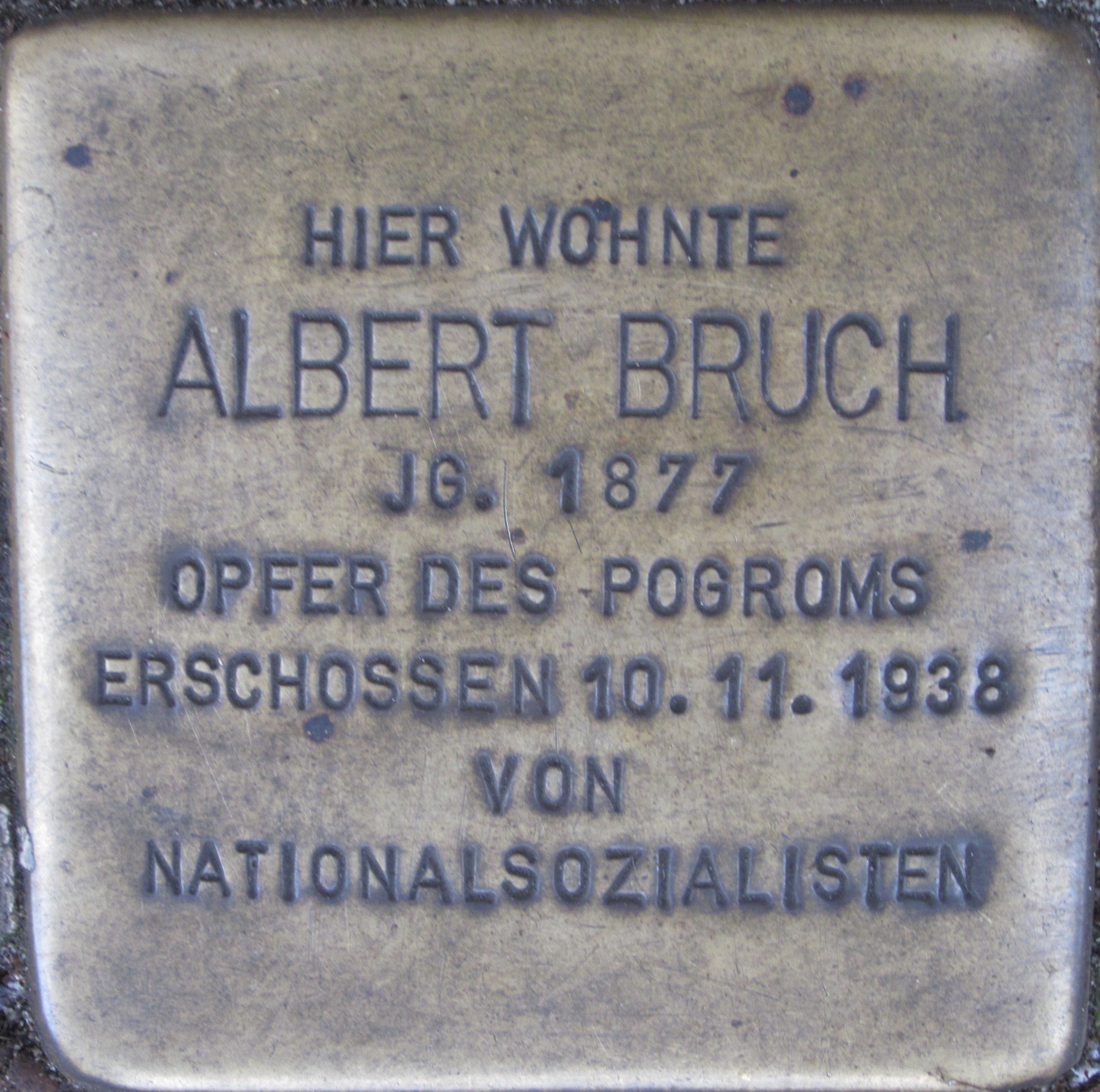 Stolperstein von Albert Bruch in Lünen